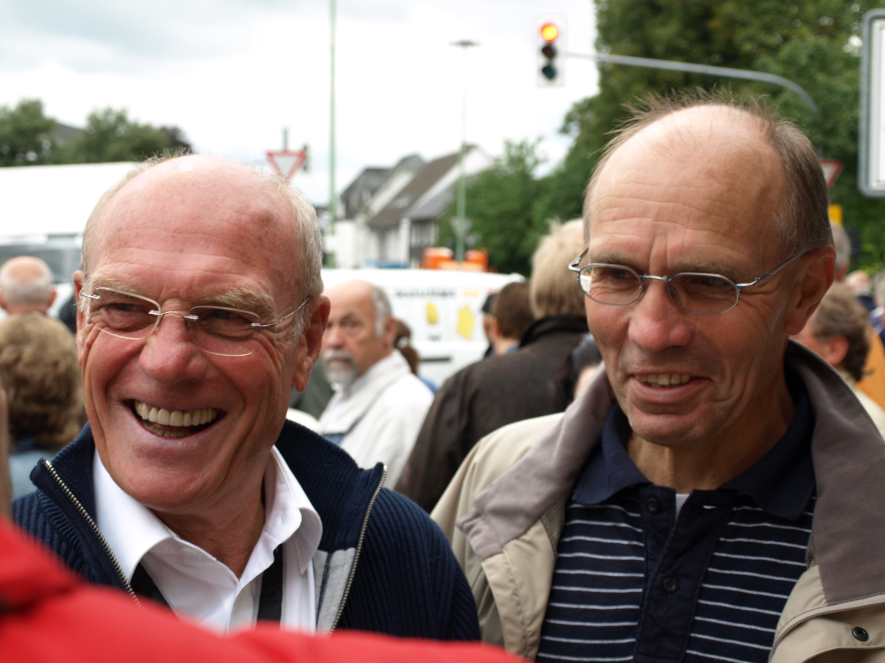 Rudi Altig (links) und Wilfried Trott anlässlich der Deutschlandtour 2008 in Radevormwald